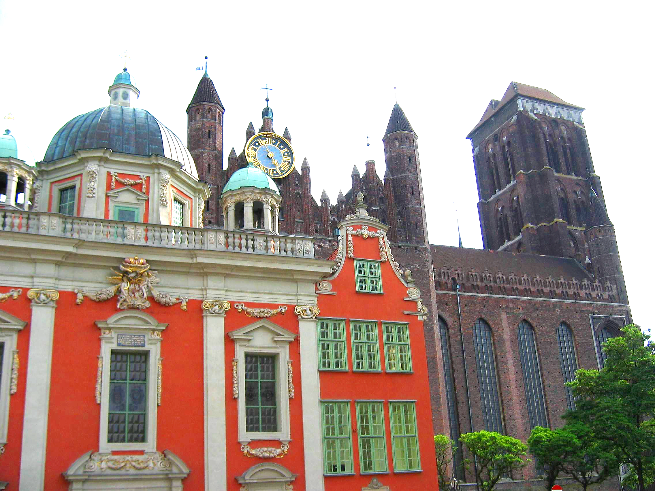 Bazylika Mariacka in Gdańsk, Poland